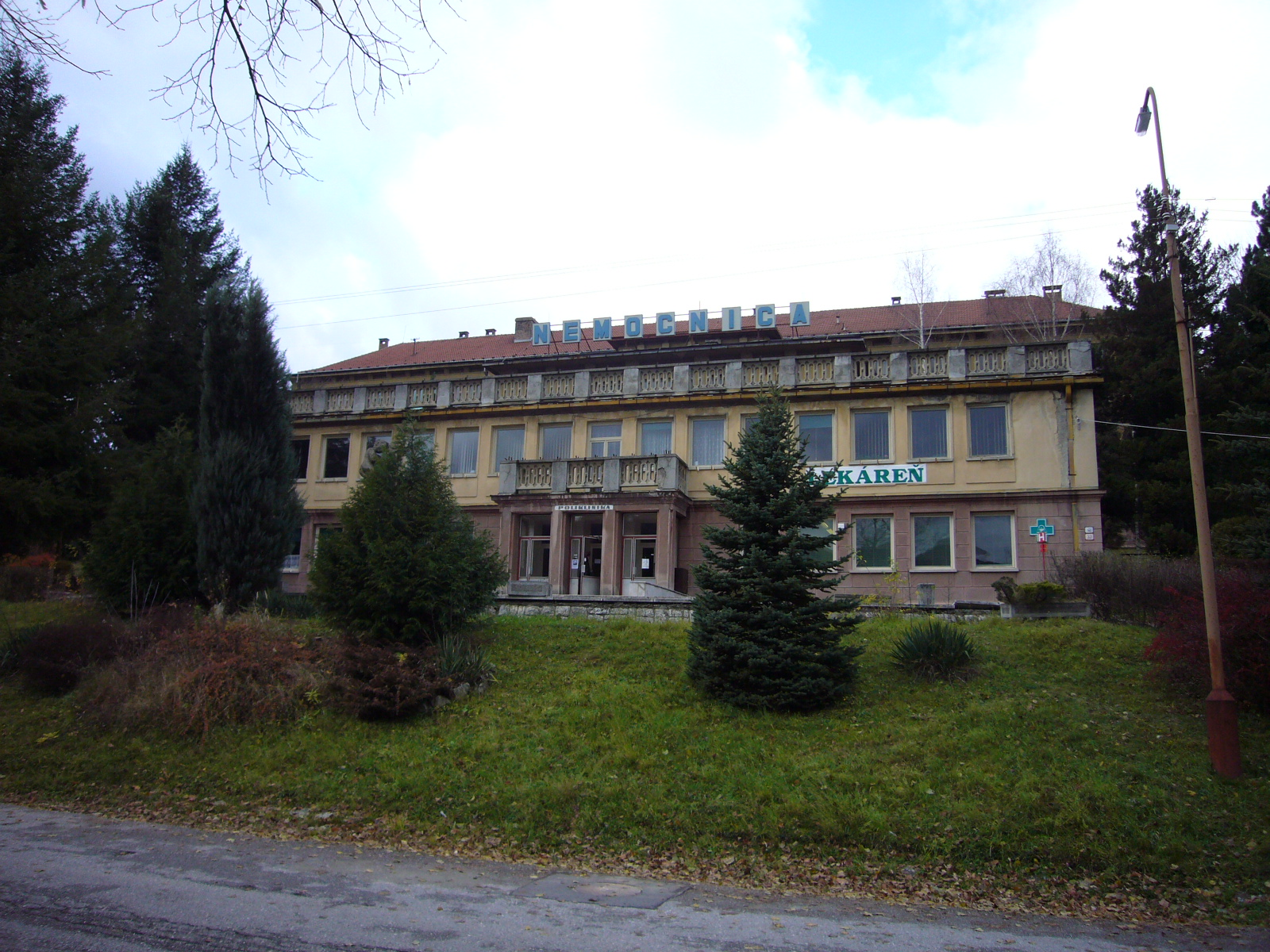 Pohľad na hlavný vstup NsP. V pozadí za nápisom vidno strechu lôžkovej časti.